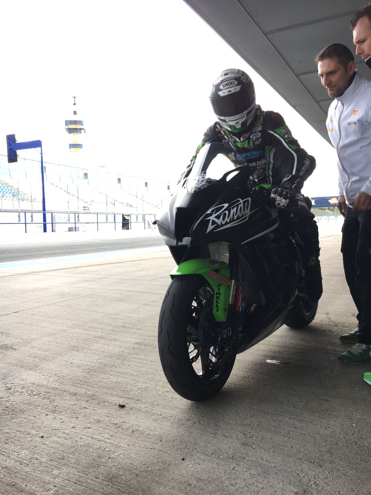 First Superbike test in Jerez Esp.